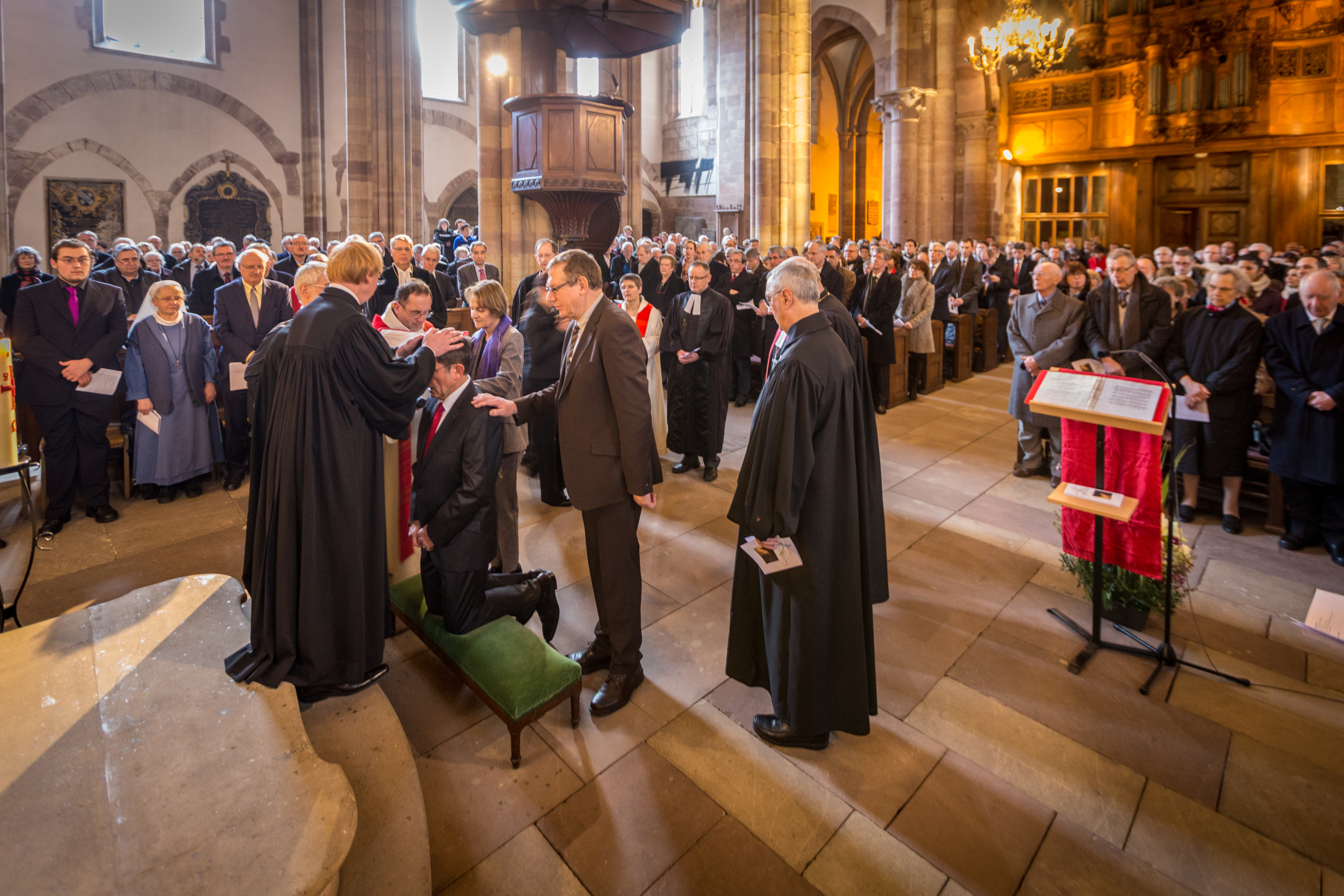 Culte d’installation de M. Christian Albecker comme président de l’Église protestante de la Confession d’Augsbourg d’Alsace et de Lorraine en l’église Saint-Thomas de Strasbourg le 9 février 2014.